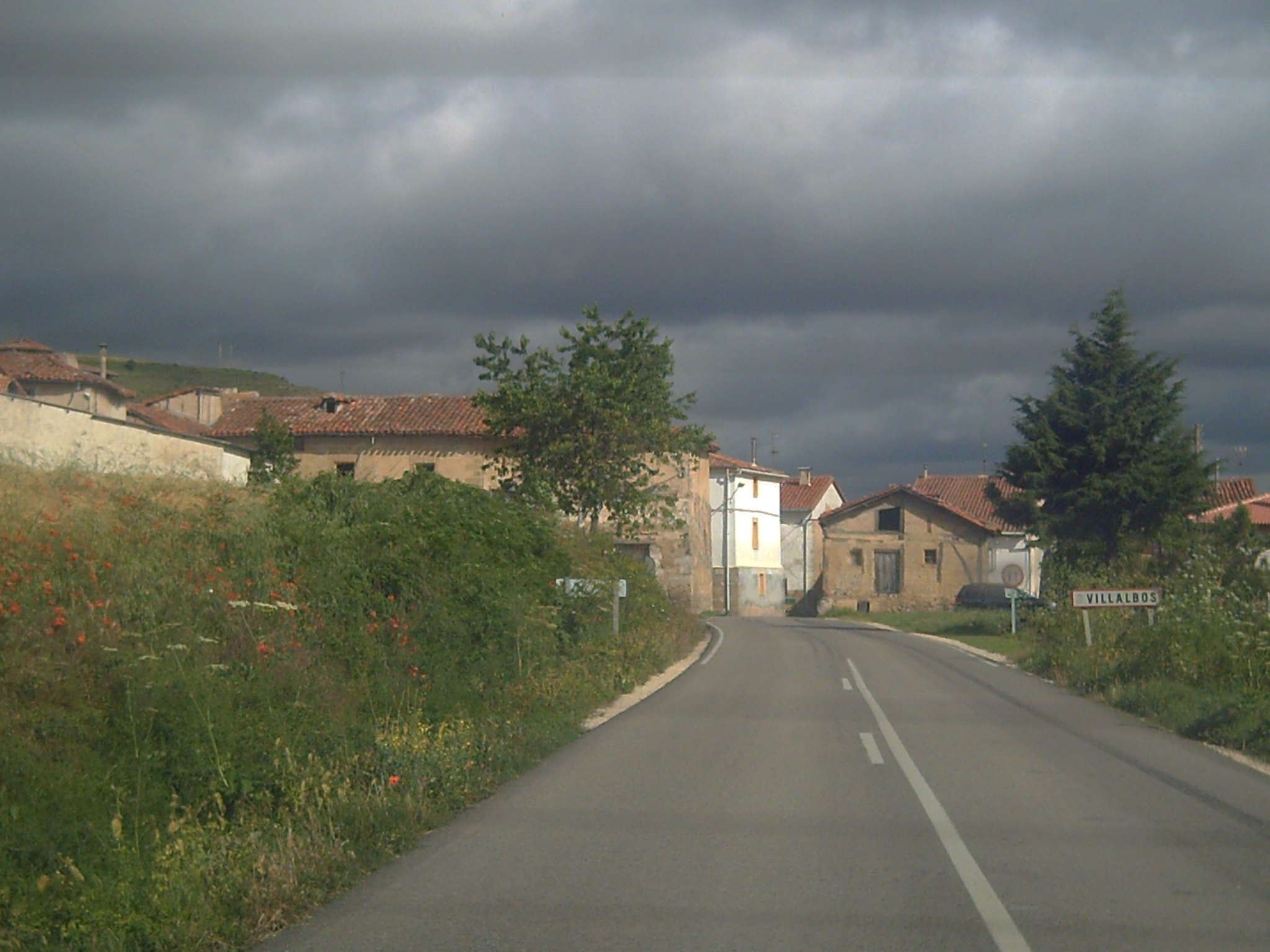 Entrada sur de Villalbos.